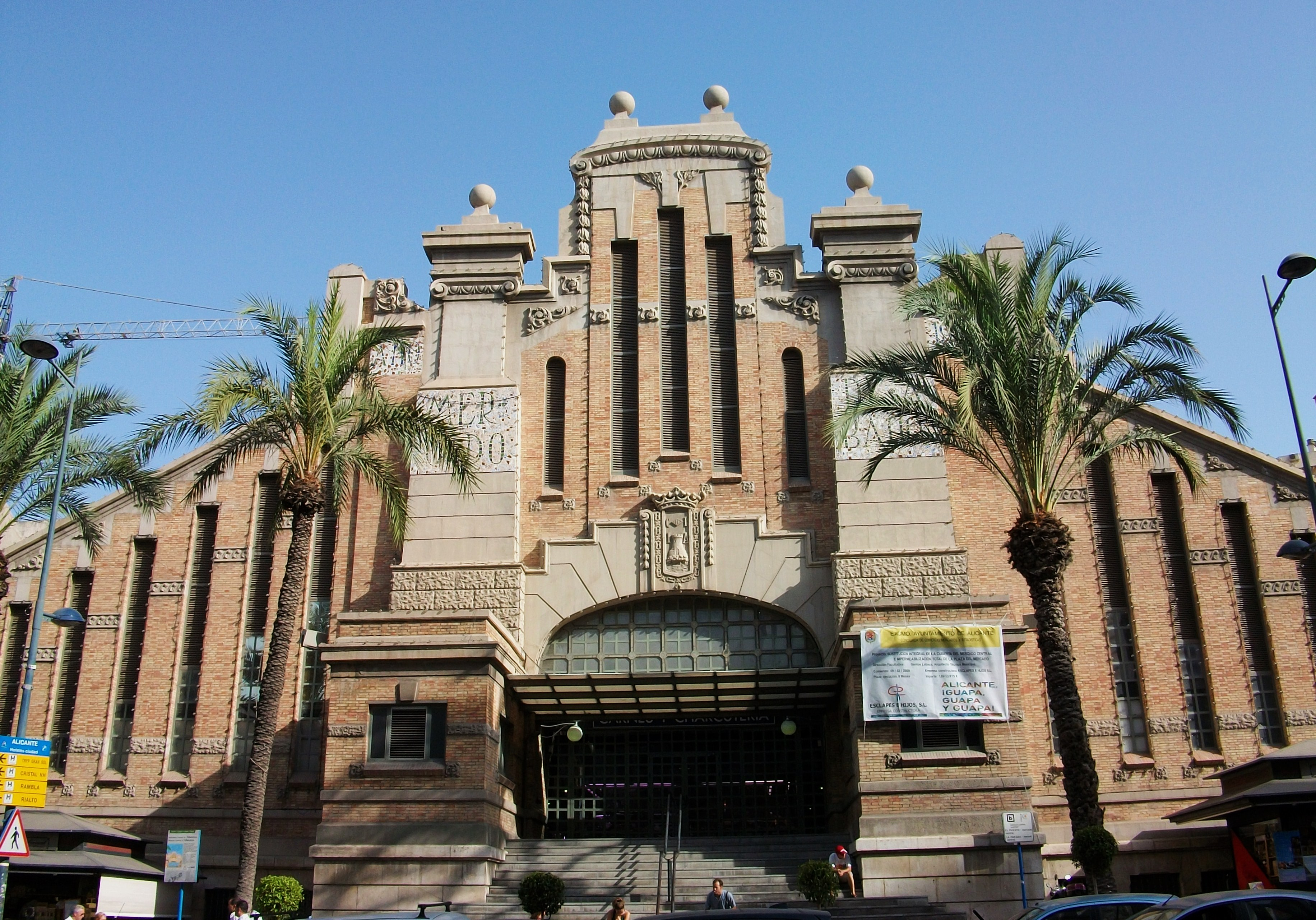 Alacant, mercat central.